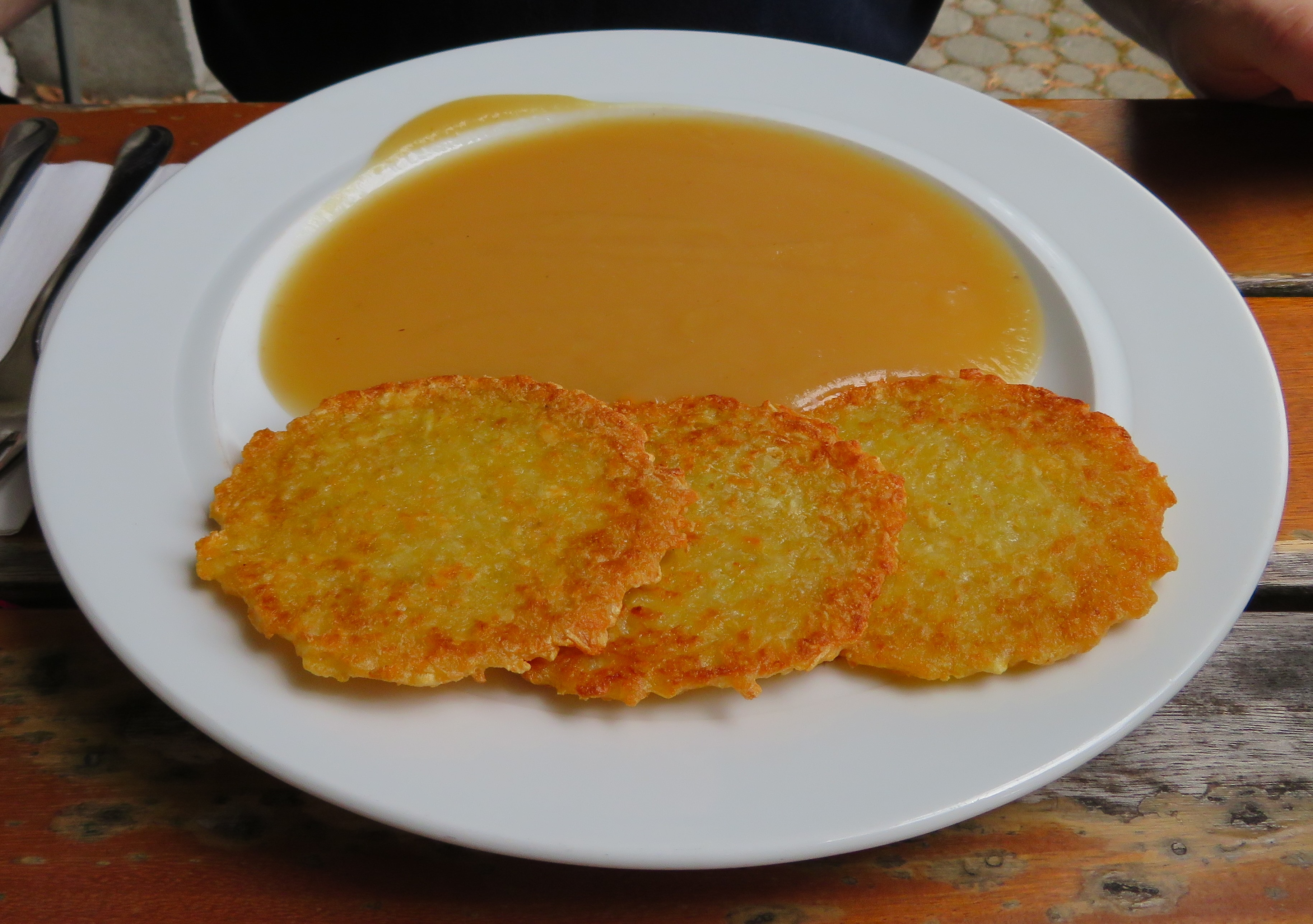 Kartoffelpuffer